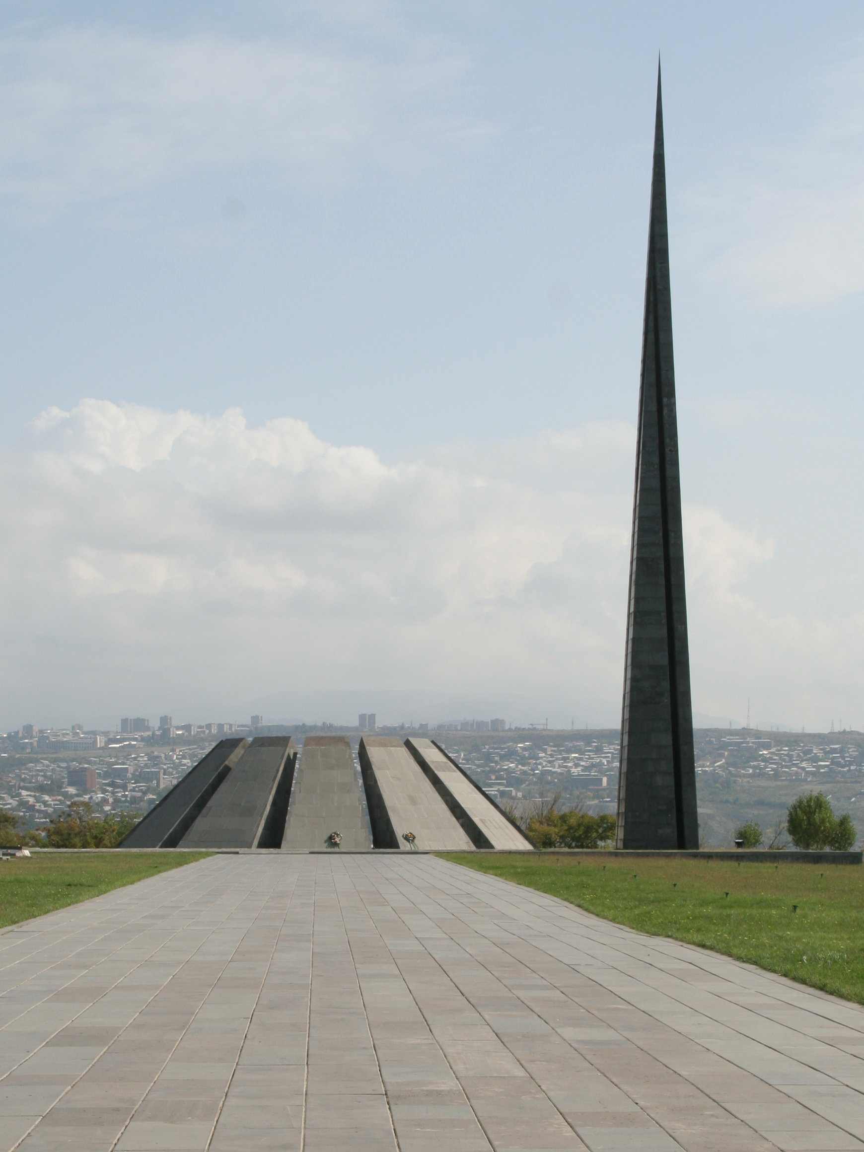 Мемориальный комплекс Цицернакаберд